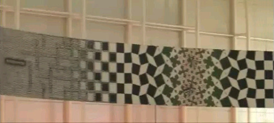 Metamorfose III (ontwerp 1968, voltooiing en onthulling 1969), gemaakt voor de wand van het hoofdpostkantoor Den Haag, nu opgehangen in Schiphol